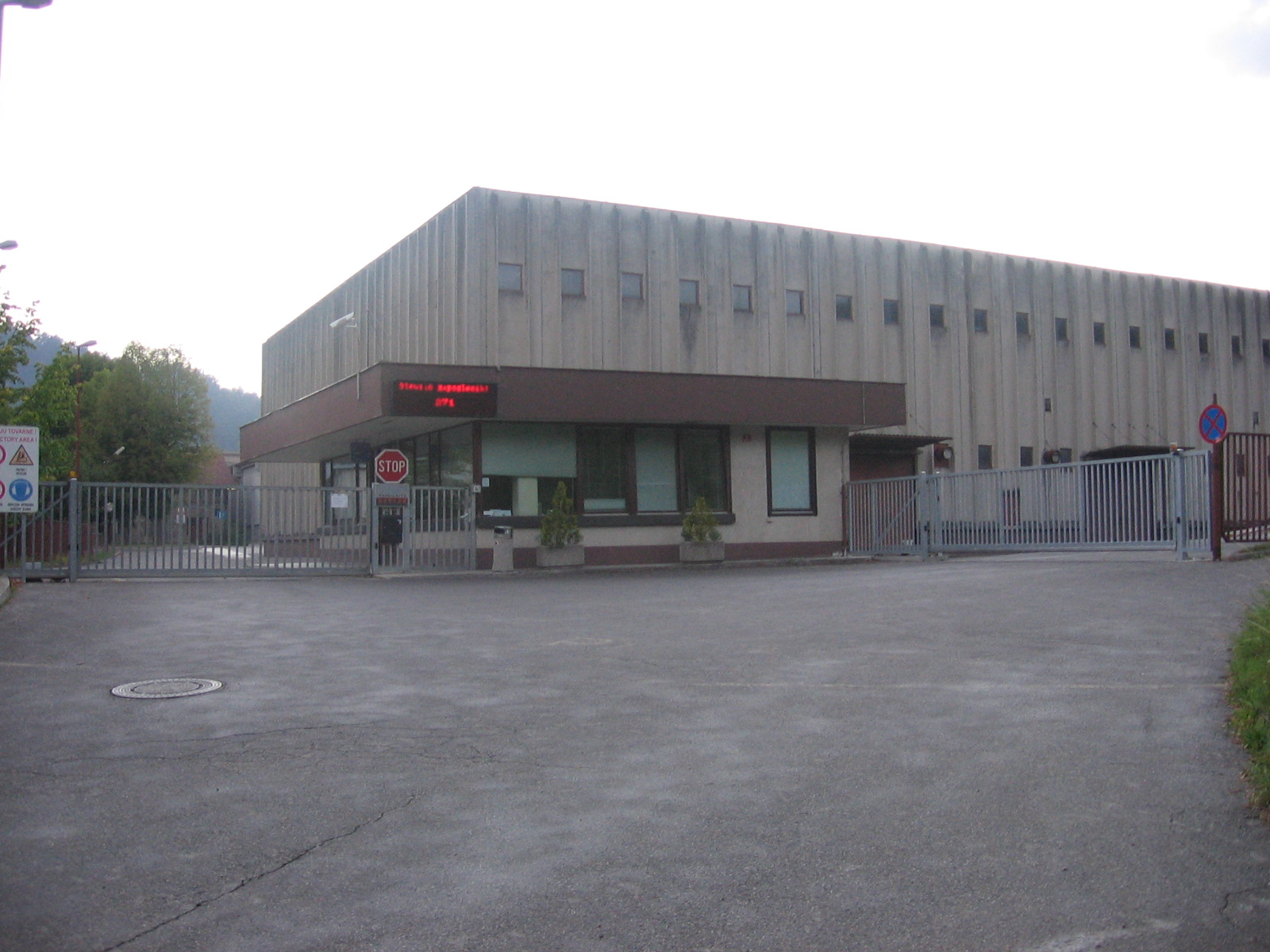 Predilnica Litija